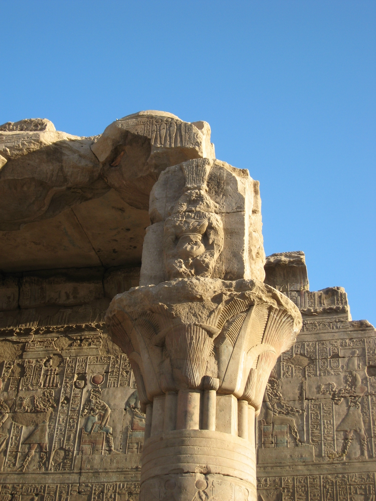 Mammisi in Edfu IMG_7068